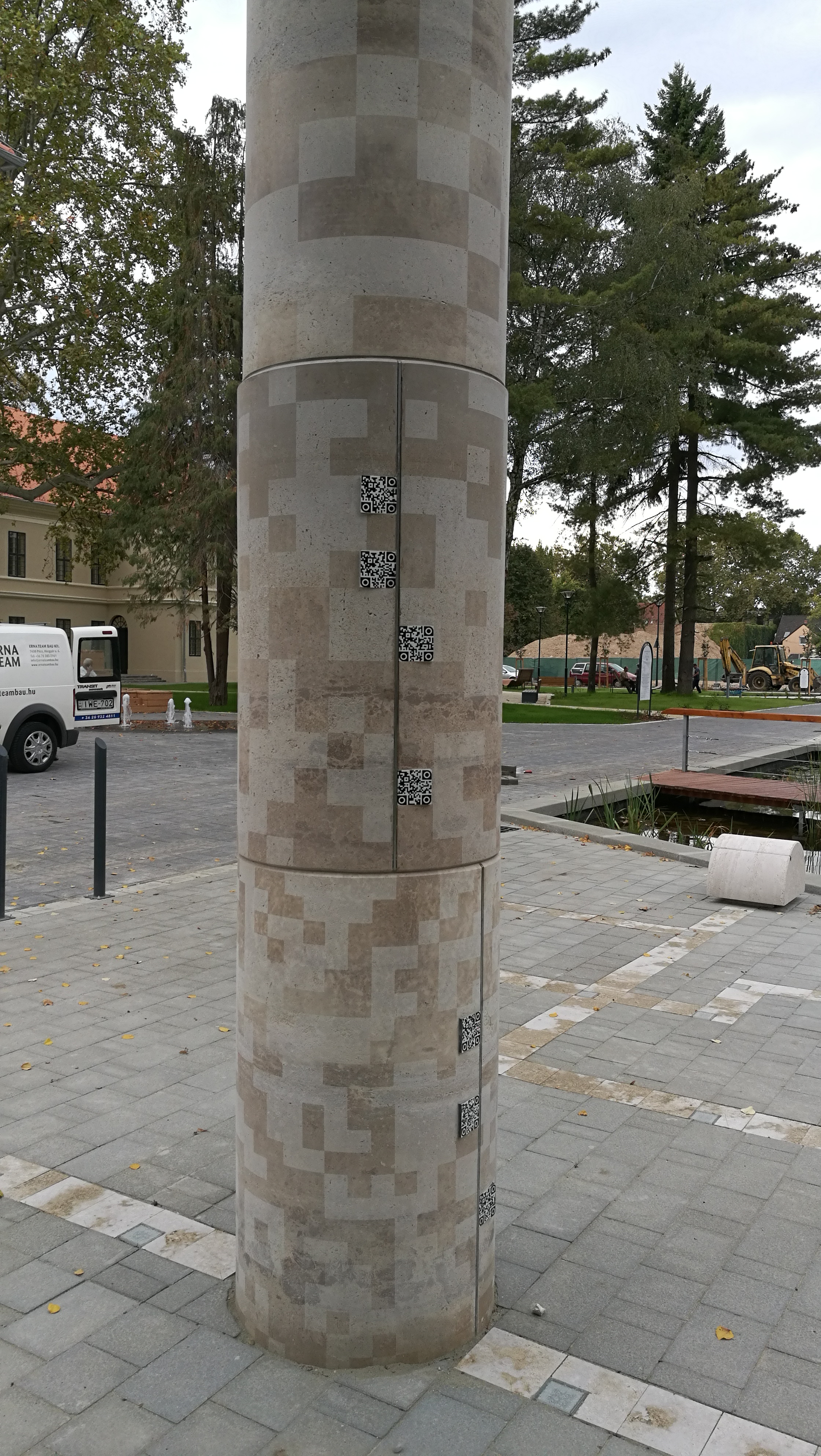 Versoszlop